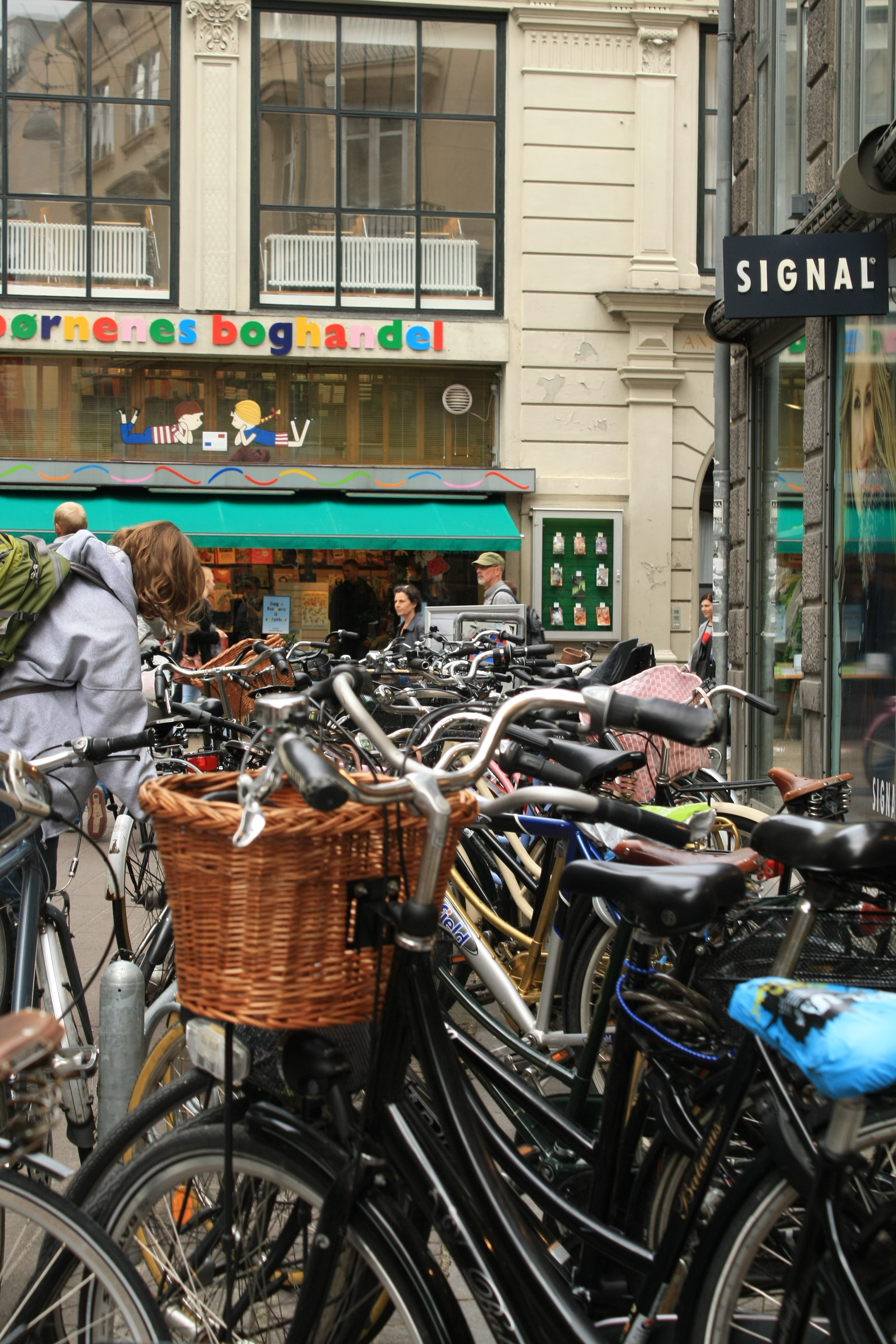 bicycle parking